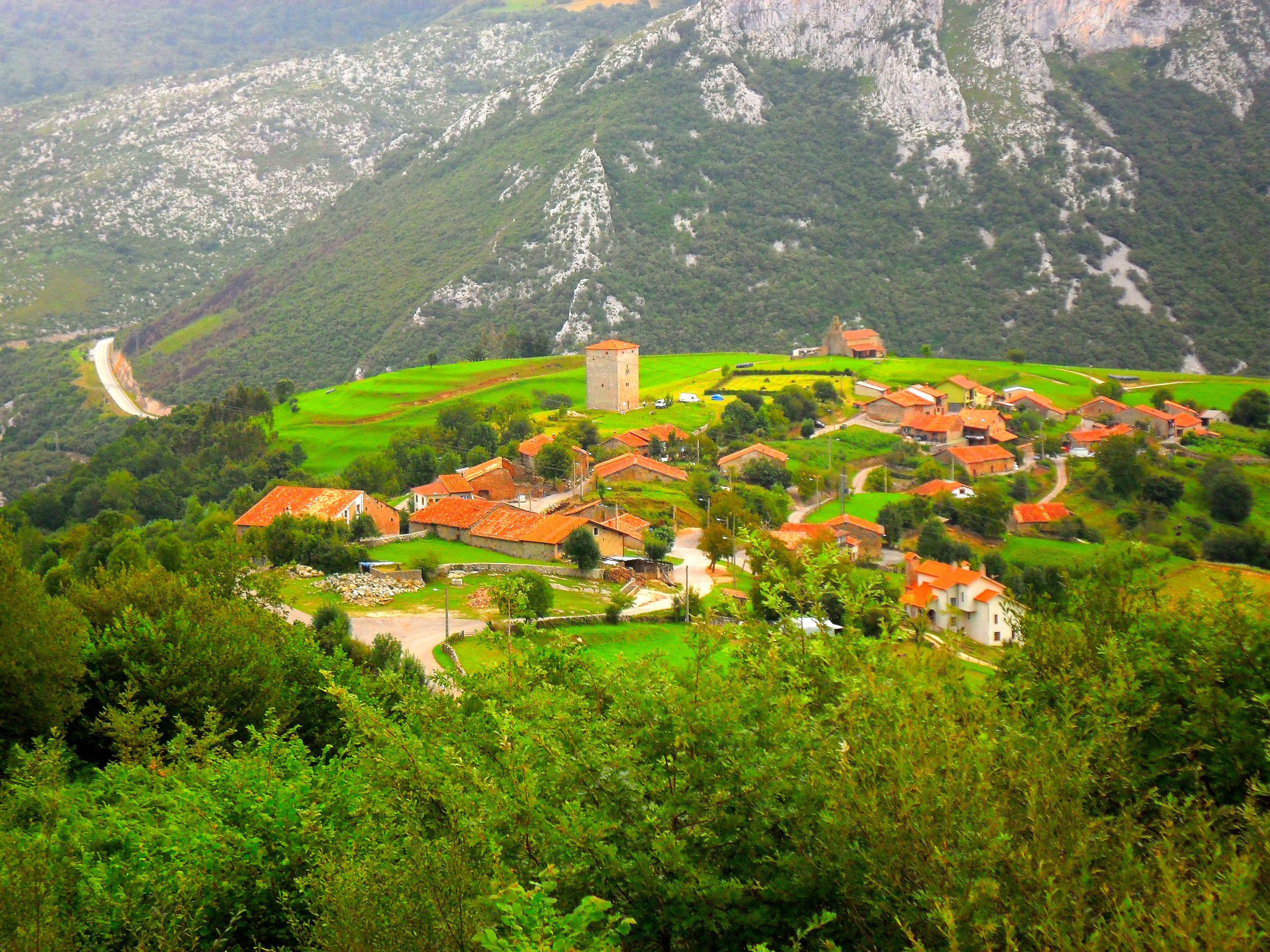 Pueblo del municipio de Rionansa que consta de iglesia, Torre medieval y tumbas romanas.